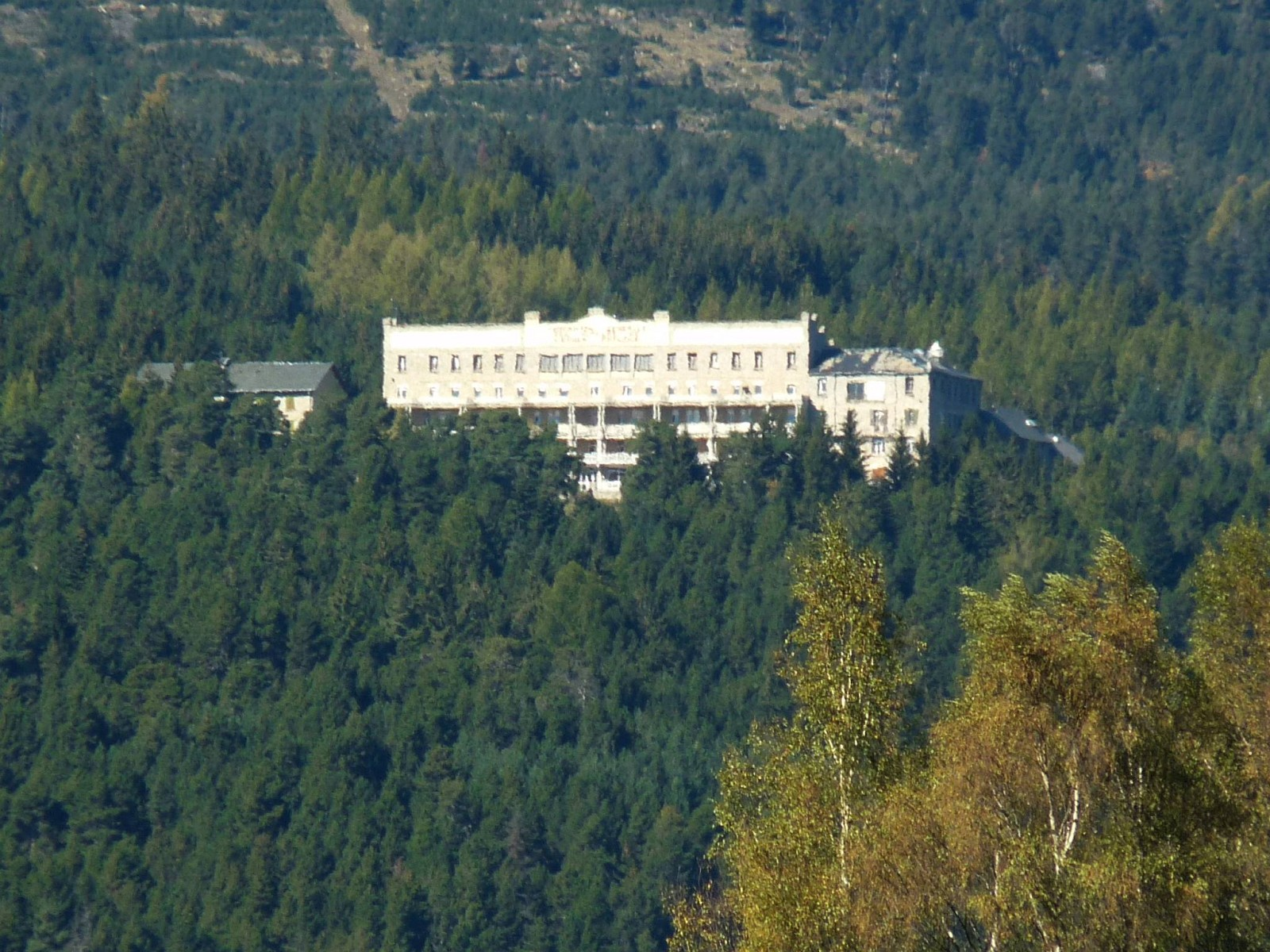 Balcon de Cerdagne, Font-Romeu, Pyrénées-Orientales, France